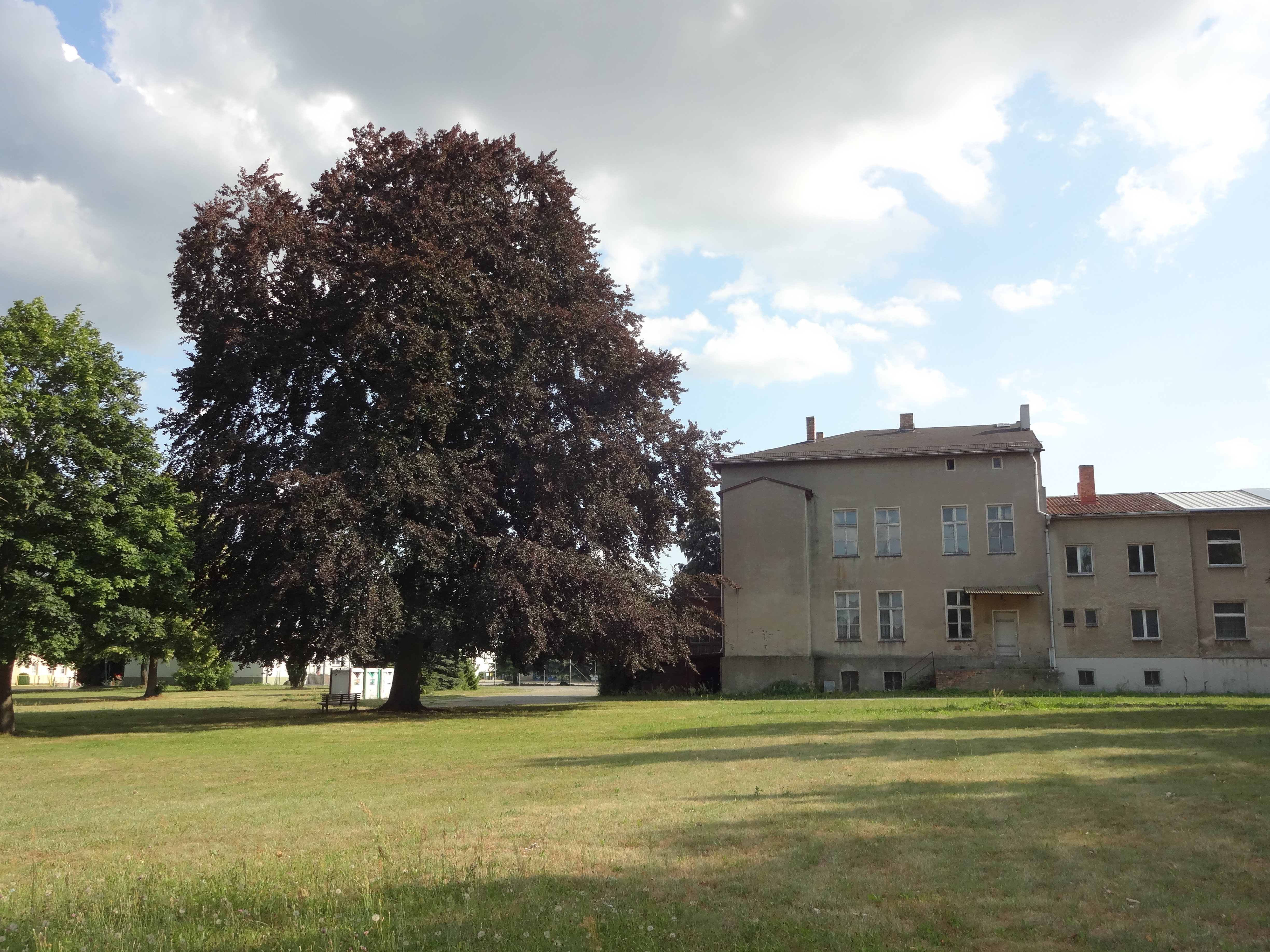 als Naturdenkmal geschützte Blutbuche am Dorfanger in Bronkow